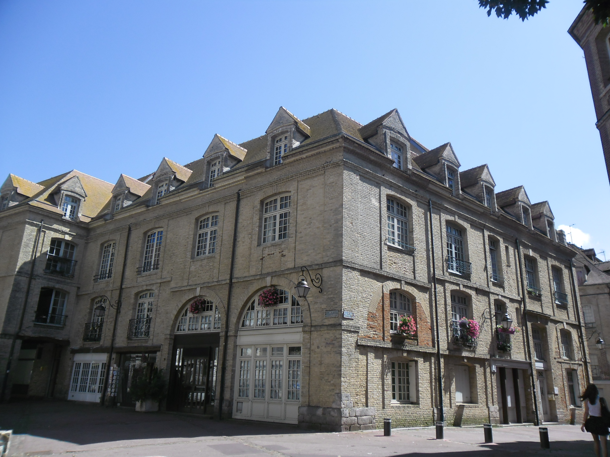 Quartier Saint Catherine à Dieppe, France